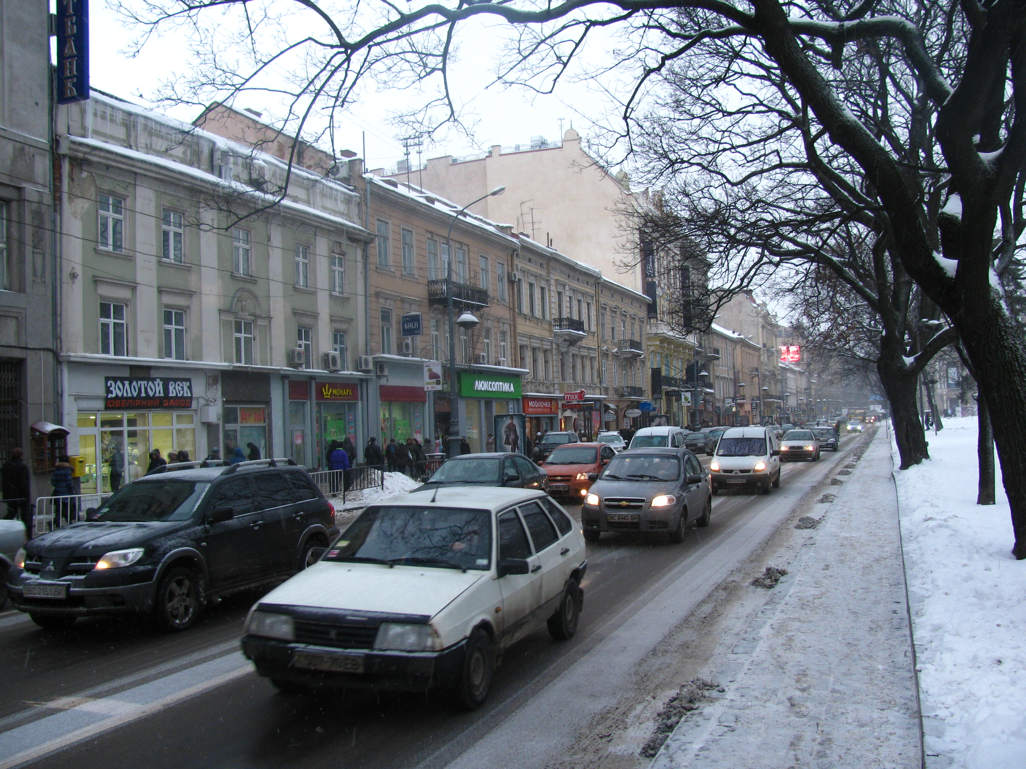 Проспект Свободи.jpg: проїжджа частина проспекту Свободи у Львові з машинами